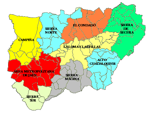 Nuevo mapa de las comarcas de Jaén (España) tras la nueva disposición de la Junta de Andalucia de 2003